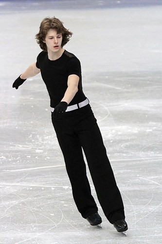 Павел Игнатенко (Белоруссия) на чемпионате мира по фигурному катанию среди юниоров 2012